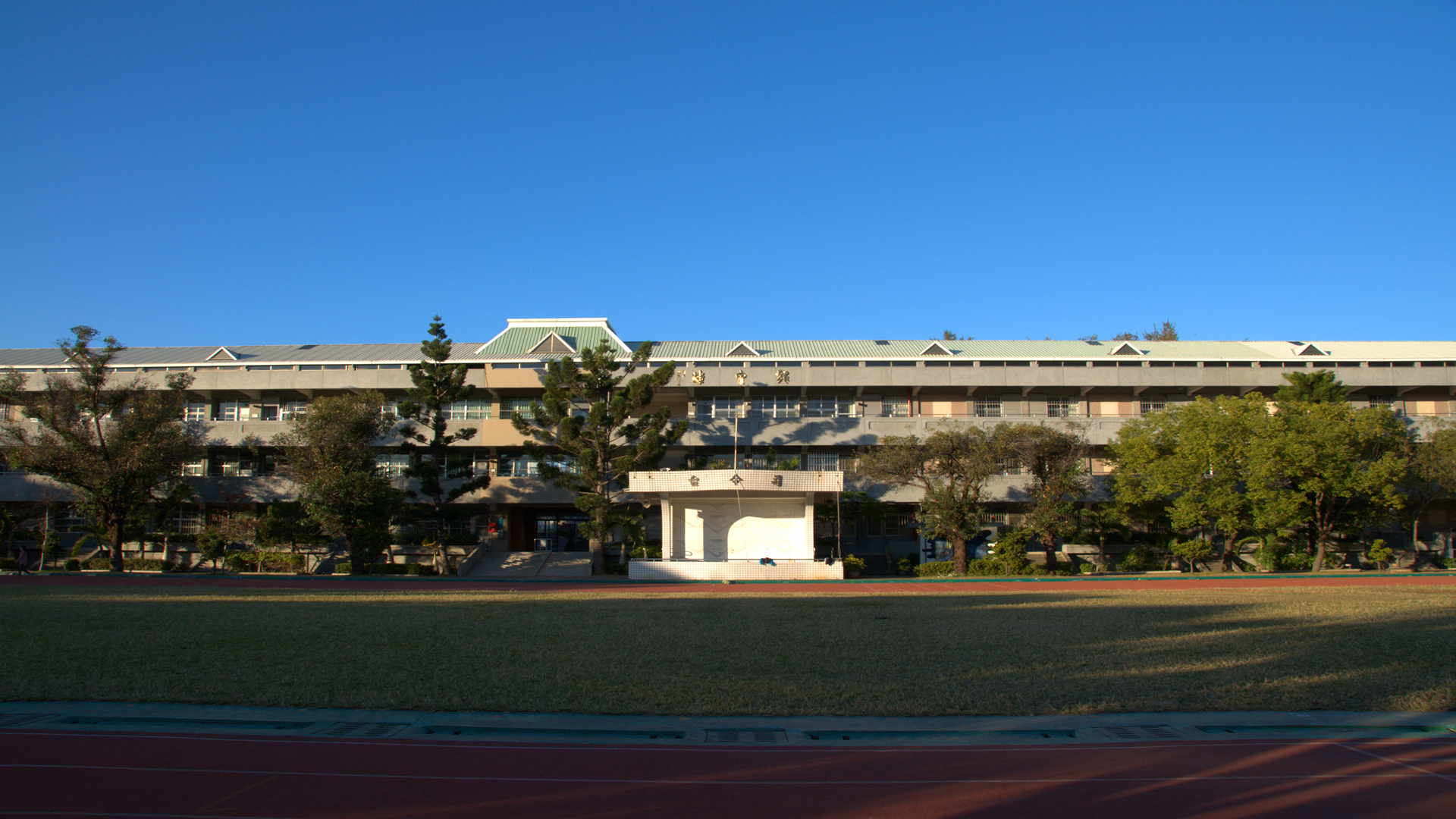 龍泉國小龍泉樓正對面一覽。